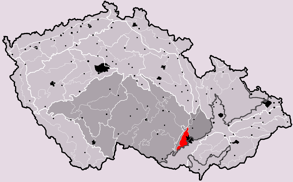 Poloha geomorfologického celku Bobravská vrchovina v rámci České republiky. Hercynský systém Hercynská pohoří I Česká vysočina I2 (II) Česko-moravská subprovincie I2D (IID) Brněnská vrchovina I2D-2 (IID-2) Bobravská vrchovina